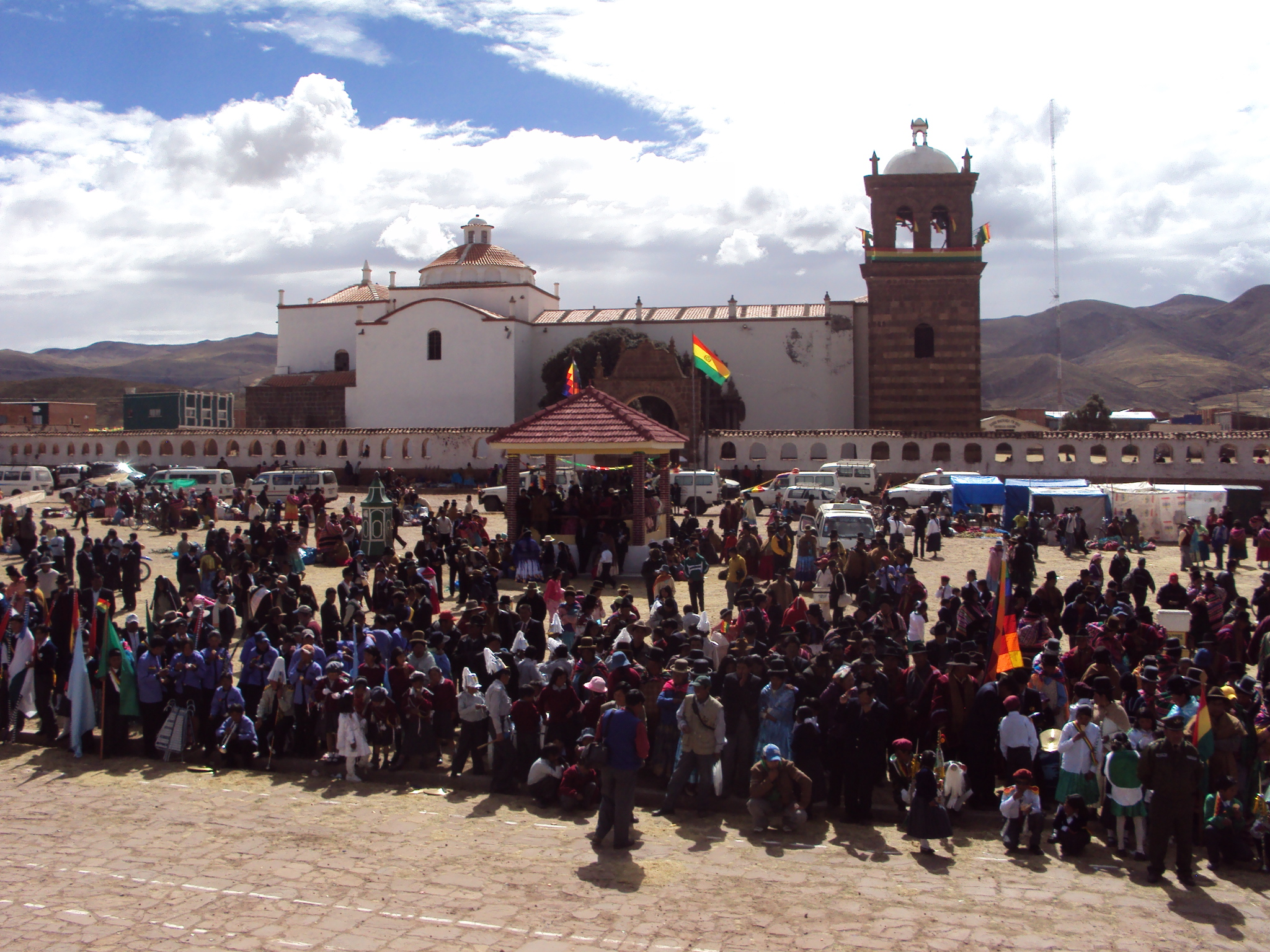 Templo de Jesús de Machaca This medium shows the protected monument with the number L/00-314 in Bolivia.